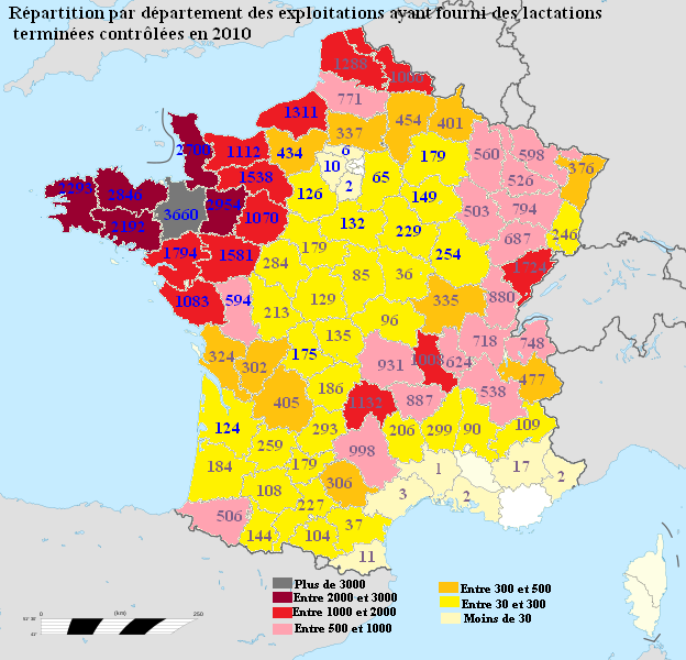 Répartition des exploitations de bovins laitiers soumises au contrôle laitier en 3010